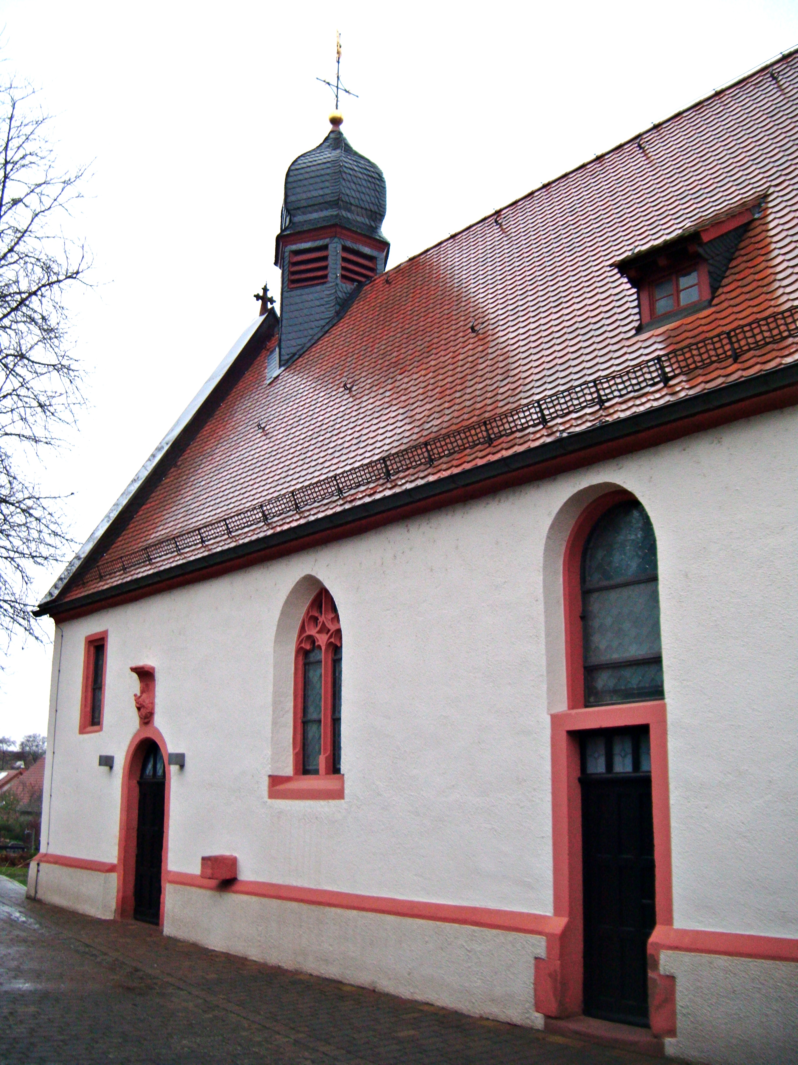 Kath. Kirche St. Valentin (früher St. Martin), Mertesheim, um 1500, ehemalige Eigenkirche der Abtei Glandern in Lothringen